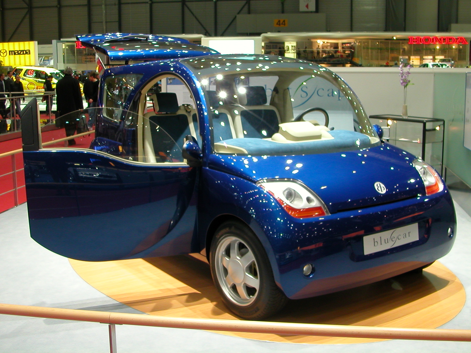 Bolloré Blue Car in Geneva 2006BleuCar